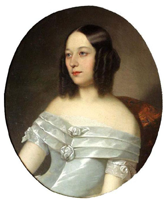 Графиня Екатерина Александровна Зубова (1811-1843), ур. Оболенская, с 1831 года жена графа В. Н. Зубова